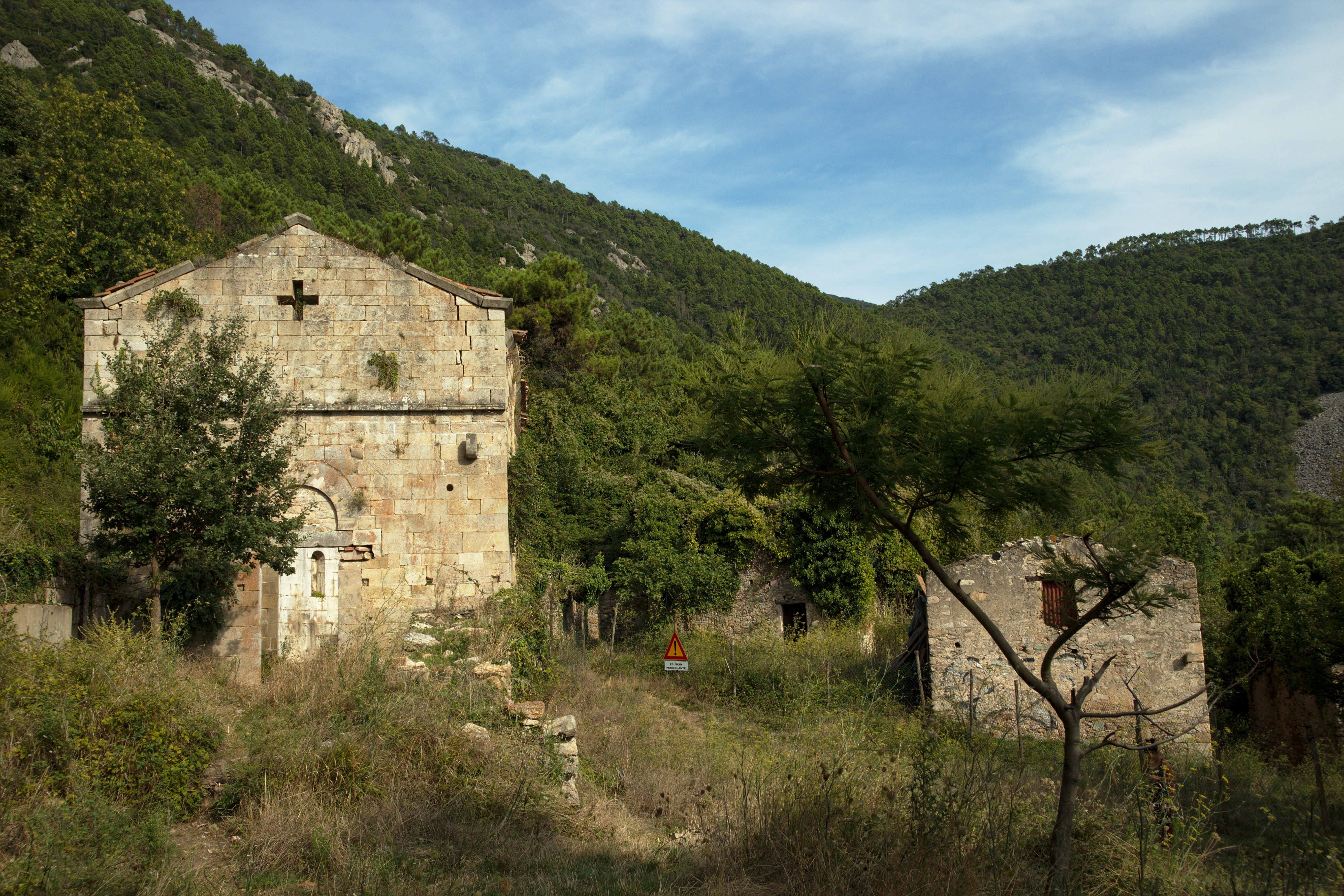 Vista di Mirteto con la chiesa di Santa Maria.